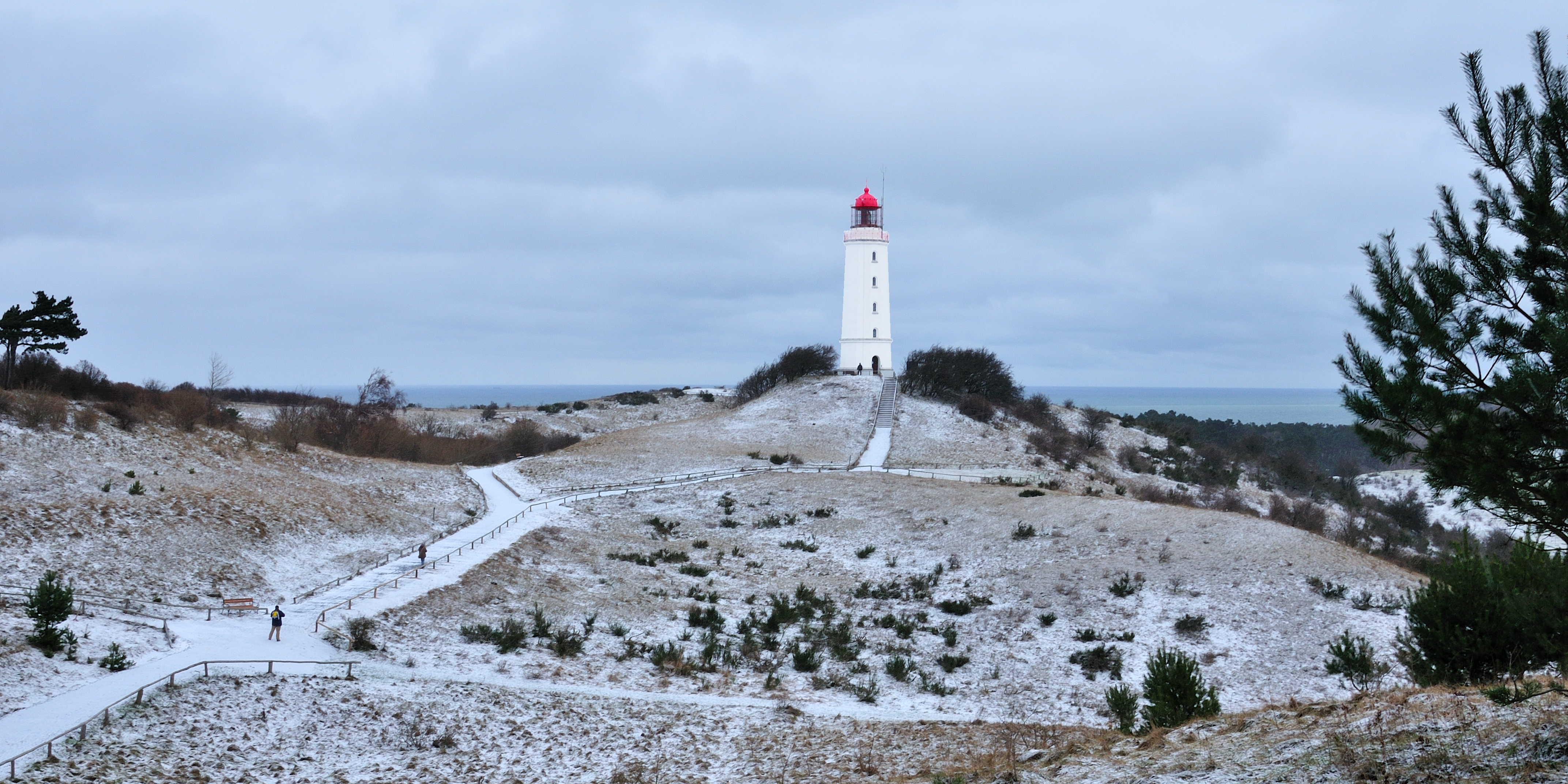 Blick aus SSW auf den Leuchtturm auf dem Schluckswiek (Dornbusch, Hiddensee) – Landschaftliche Modellierung und Vegetation einer Kreidekalk-Steilküste an der Ostsee im Nationalpark Vorpommersche Boddenlandschaft